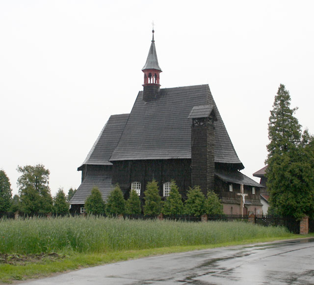 Kościół pod wezwaniem świętej Barbary w Kolanowicach Autor: Andrzej Margos